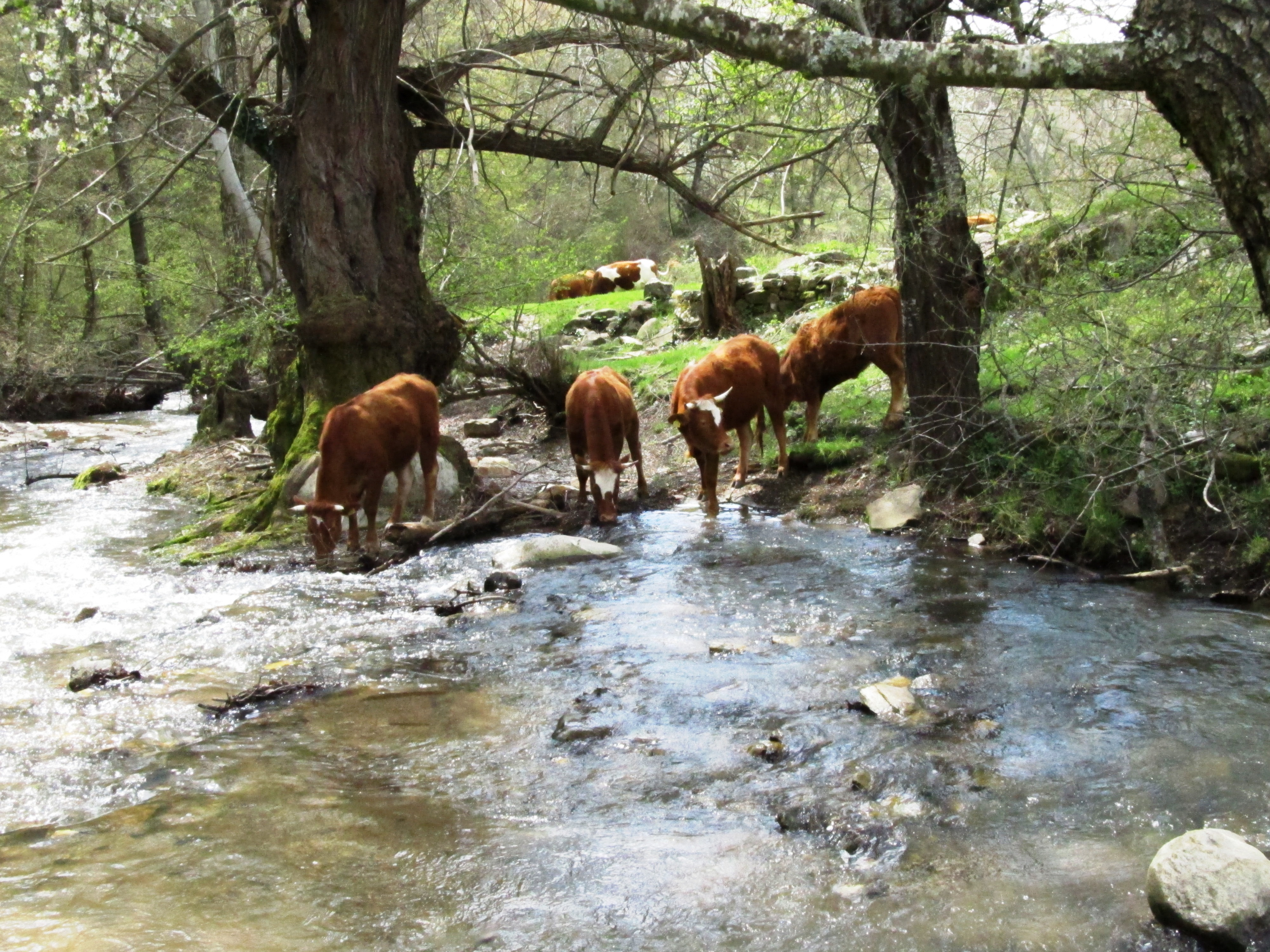 Река Серовица при село Баница (Карие), Гърция ܐܪܡܝܐ : Serovitsa River near the village of Banica (Kariye), Greece